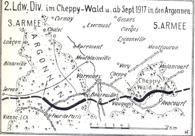 Karte Seite 71: 2. Ldw.D. im Cheppy-Wald und ab September 1917 in den Argonnen